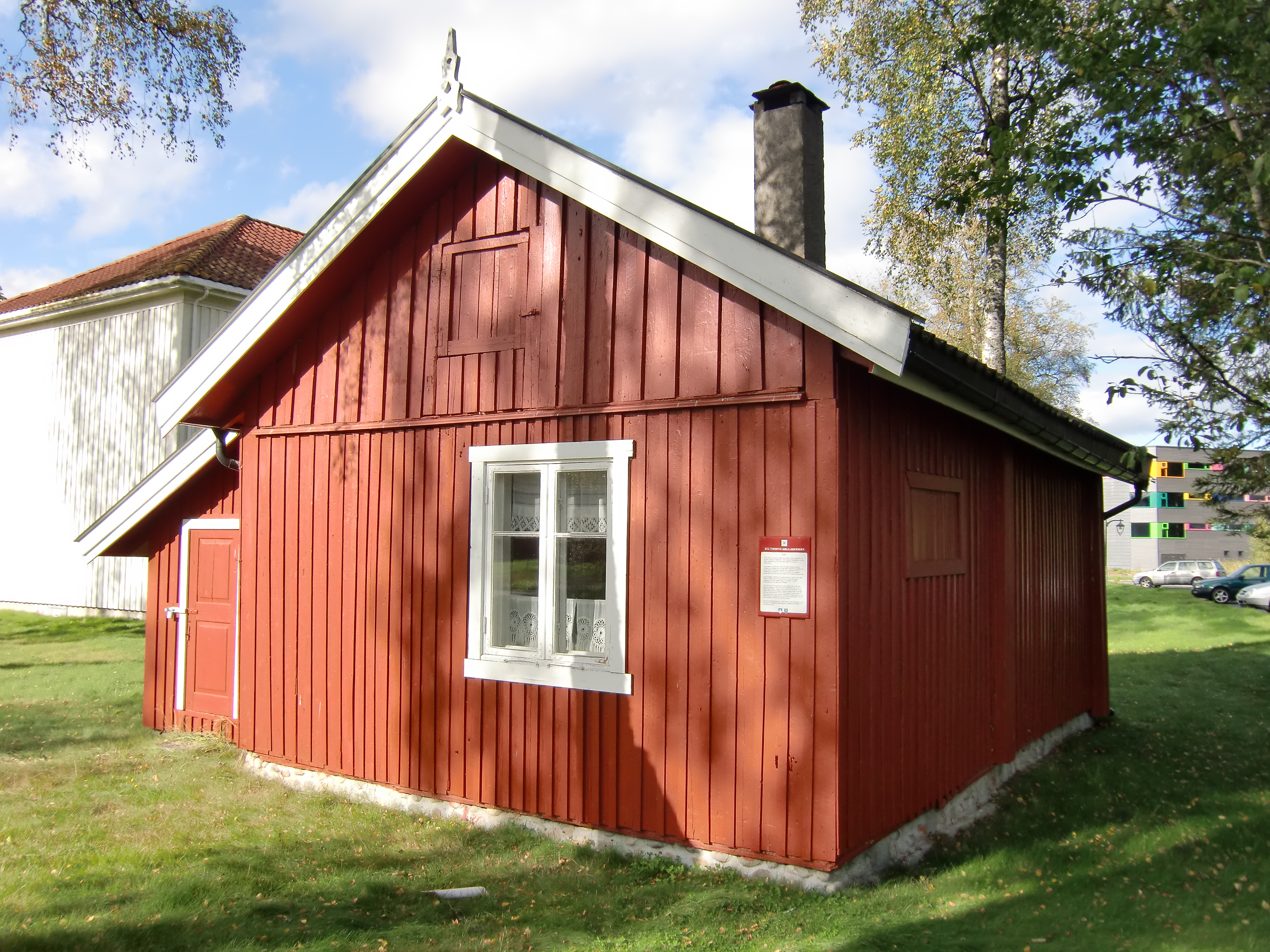 Bildet viser Furua, en av bygningene på Ullensaker museum.